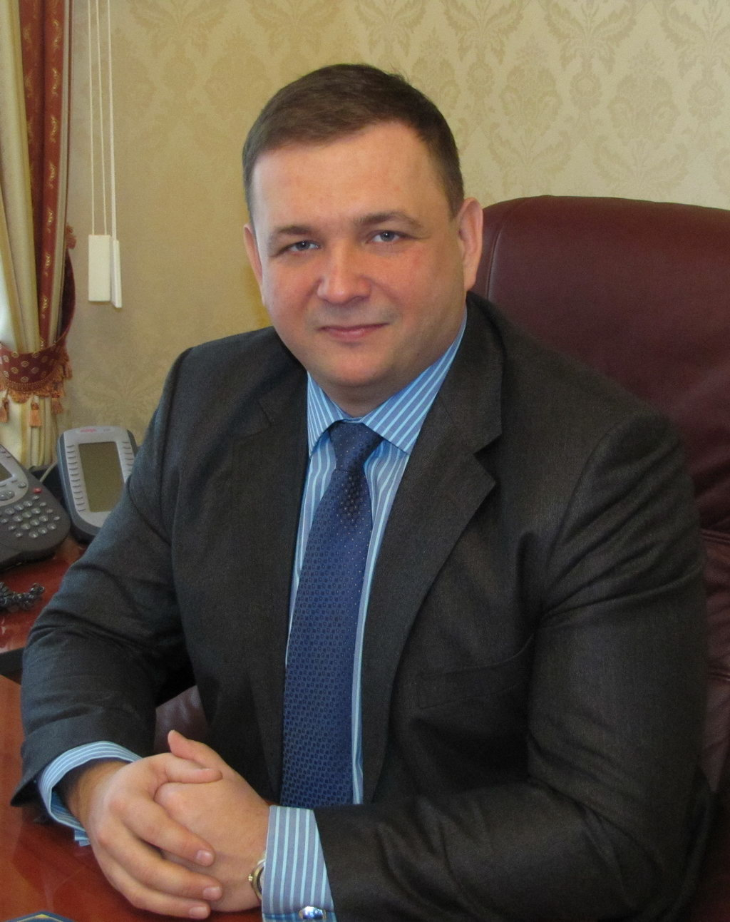 Станіслав Володимирович Шевчук — доктор юридичних наук, професор, науковець, педагог.